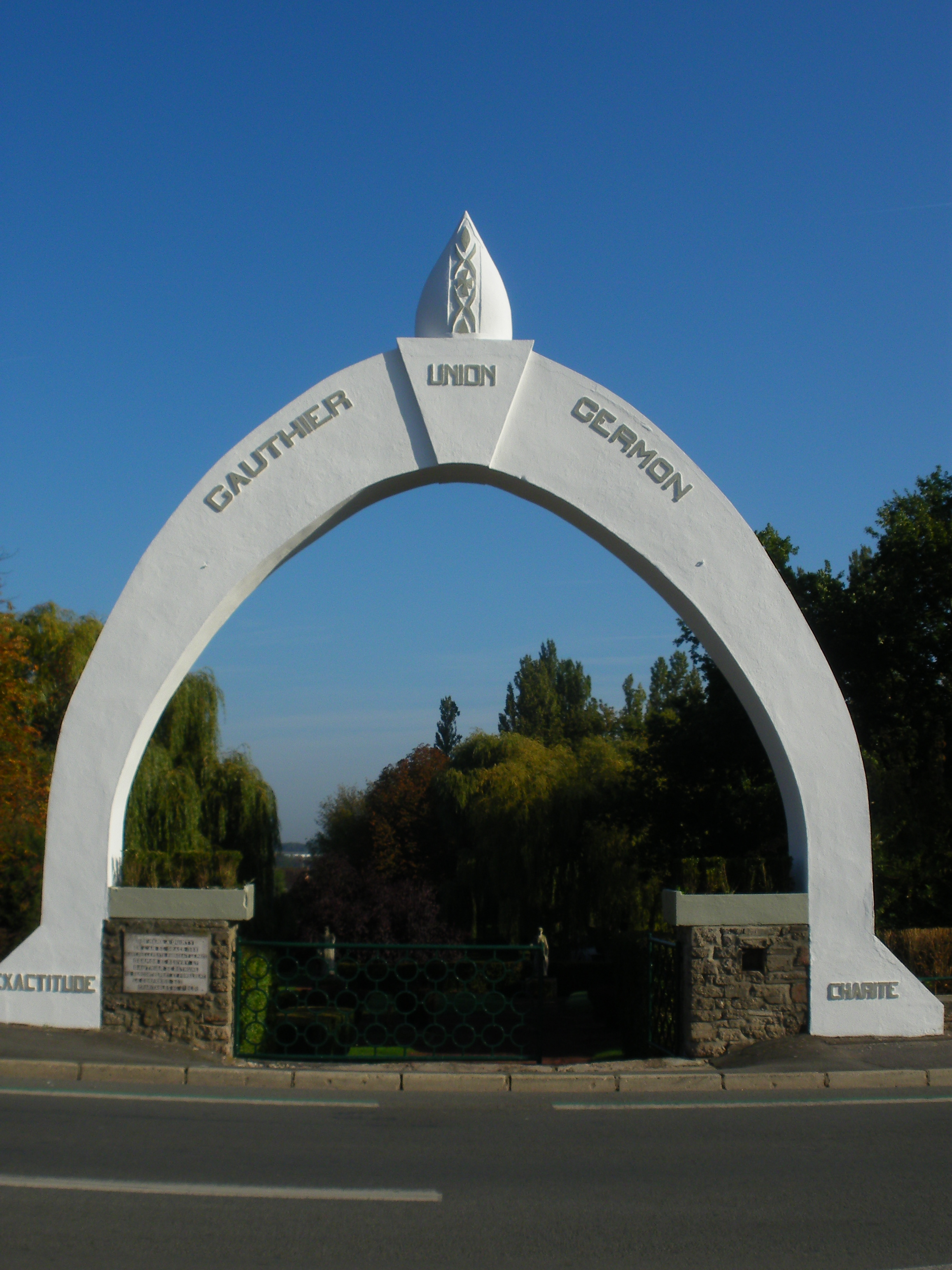 Entrée du Parc du Quinty de Beuvry. Germon et Gauthier désignent les deux membres fondateurs de la confrérie des Charitables de Béthune. Les mots "exactitude", "union" et "charité" désignent la devise de la confrérie.